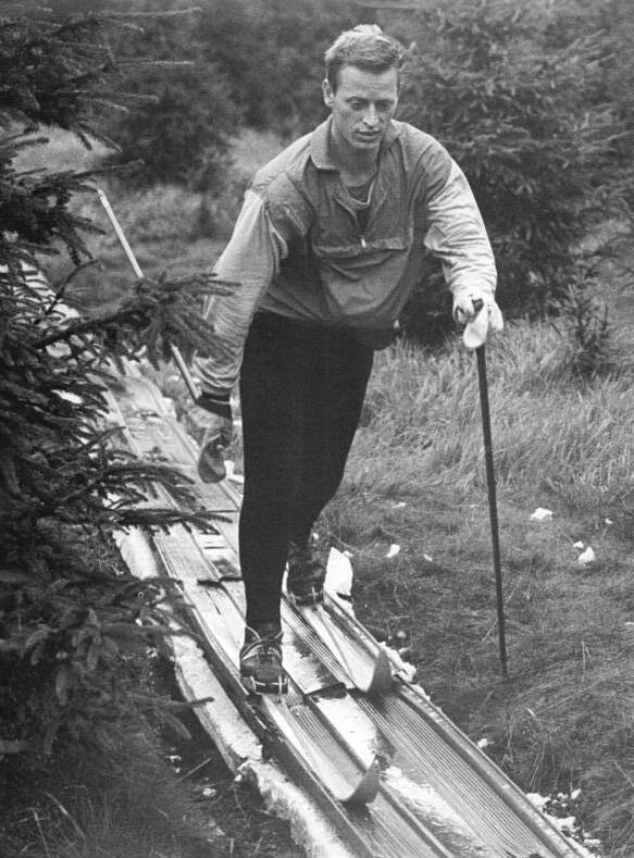 Egon Schnabel Zentralbild Studré 28.9.1967 Oberhof: Skisport in grünen Wäldern Der 30jährige Unterleutnant der Nationalen Volksarmee und Deutscher Meister der DDR im Biathlon, Egon Schnabel (ASK Vorwärts Oberhof), beim Konditionstraining auf Kunststoffmatten. Er gehört zum olympiakader für 1968 und bereitet sich intensiv auf die neue Wettkampfsaison vor. Egon Schnabel betreibt den Biathlonsport seit 1959, dem Beginn dieser Sportart in der DDR.